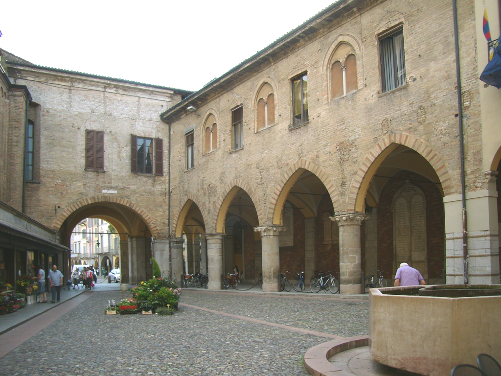 Vista di piazza Broletto a Lodi